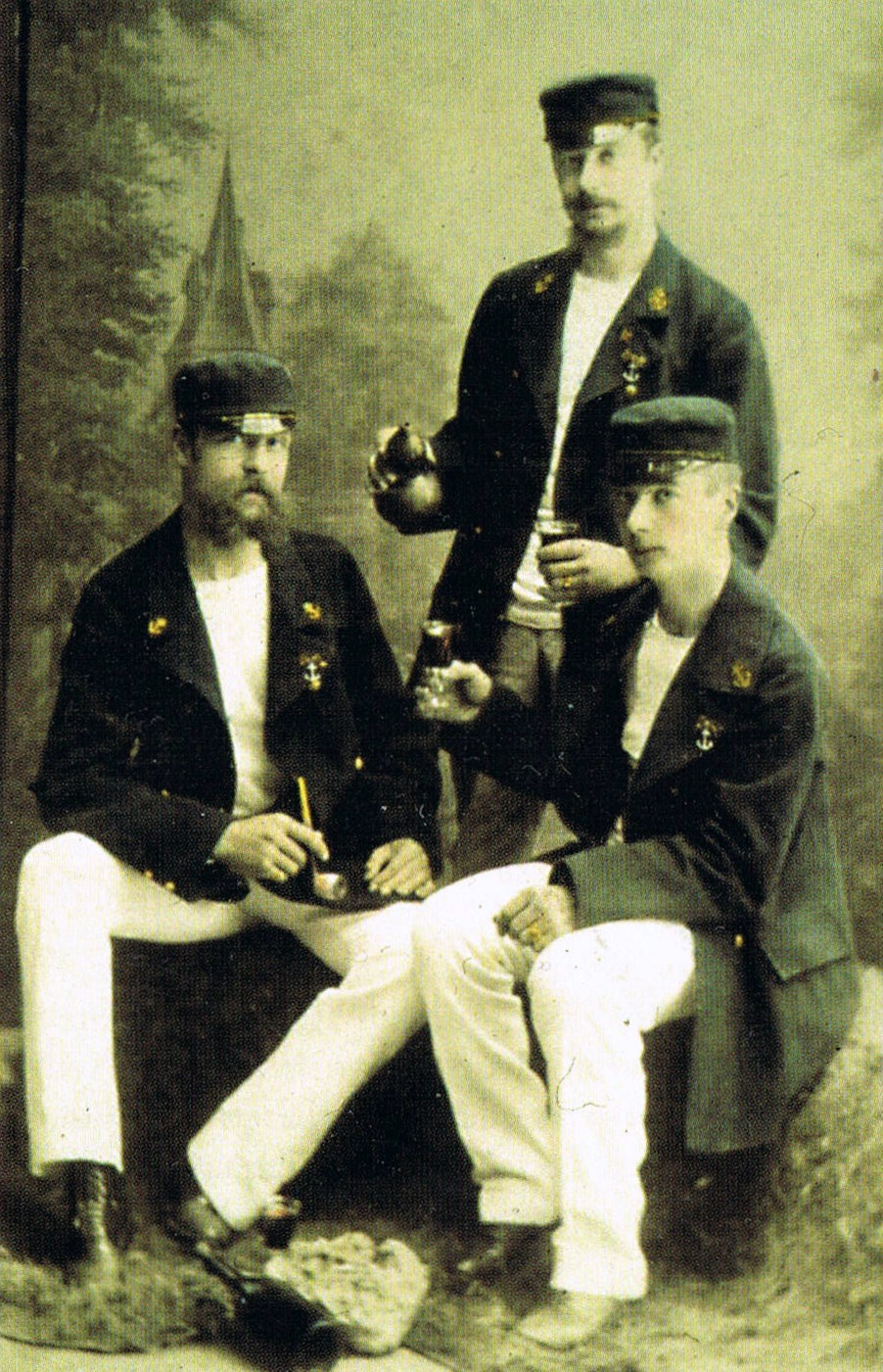 Des canotiers du Sport Nautique Bisontin, vers 1890.